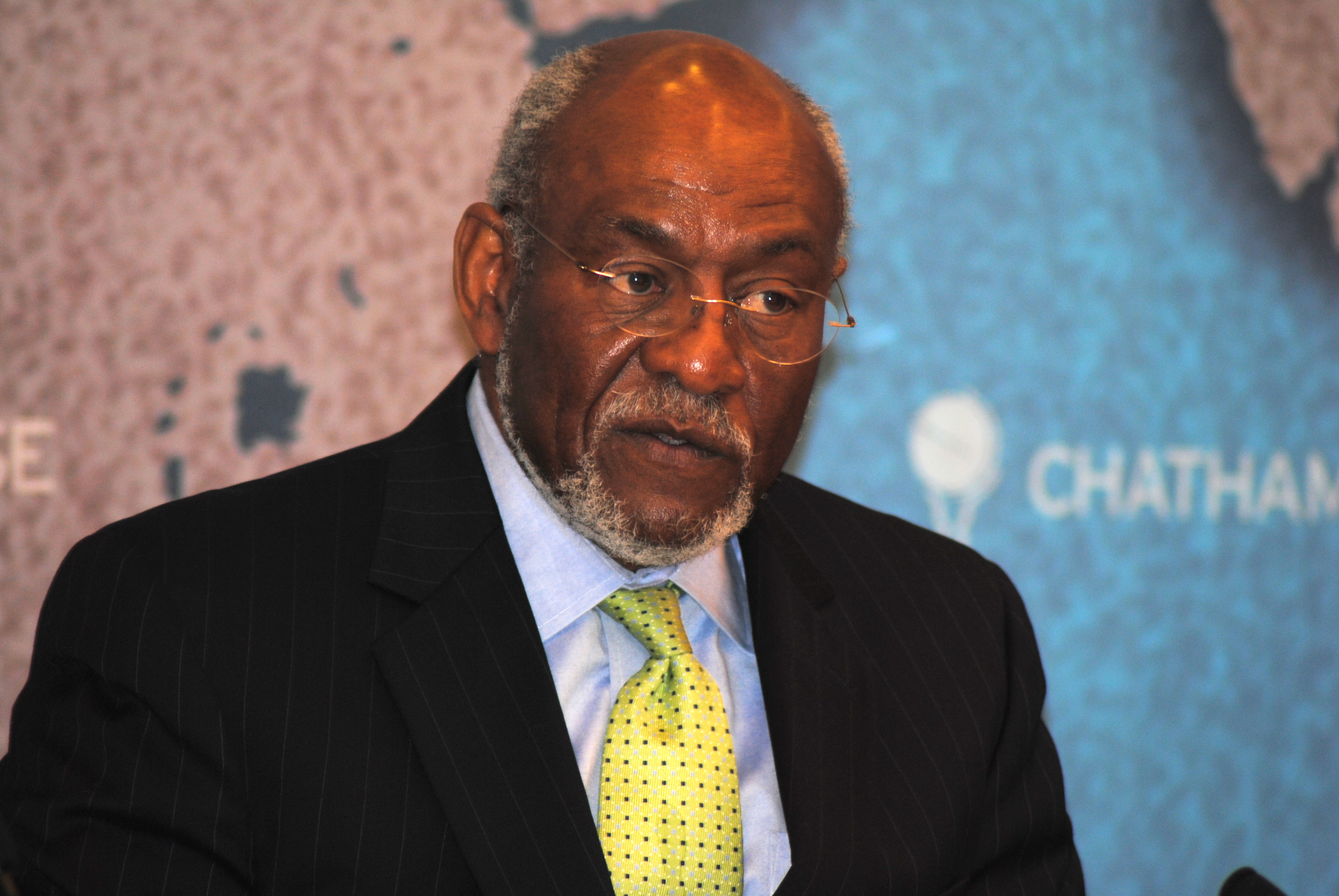 Ambassador Johnnie Carson